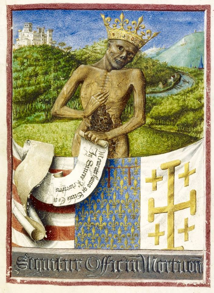 La Mort personnifiée tient une banderole sur laquelle on peut lire « Souviens-toi, homme, que tu es poussière et que tu redeviendras poussière » en latin. C'est un Memento Homo. Tiré du Livre d'Heures de René d'Anjou (dit d'Egerton), entre 1410 et 1442. BL, Egerton 1070 f.53